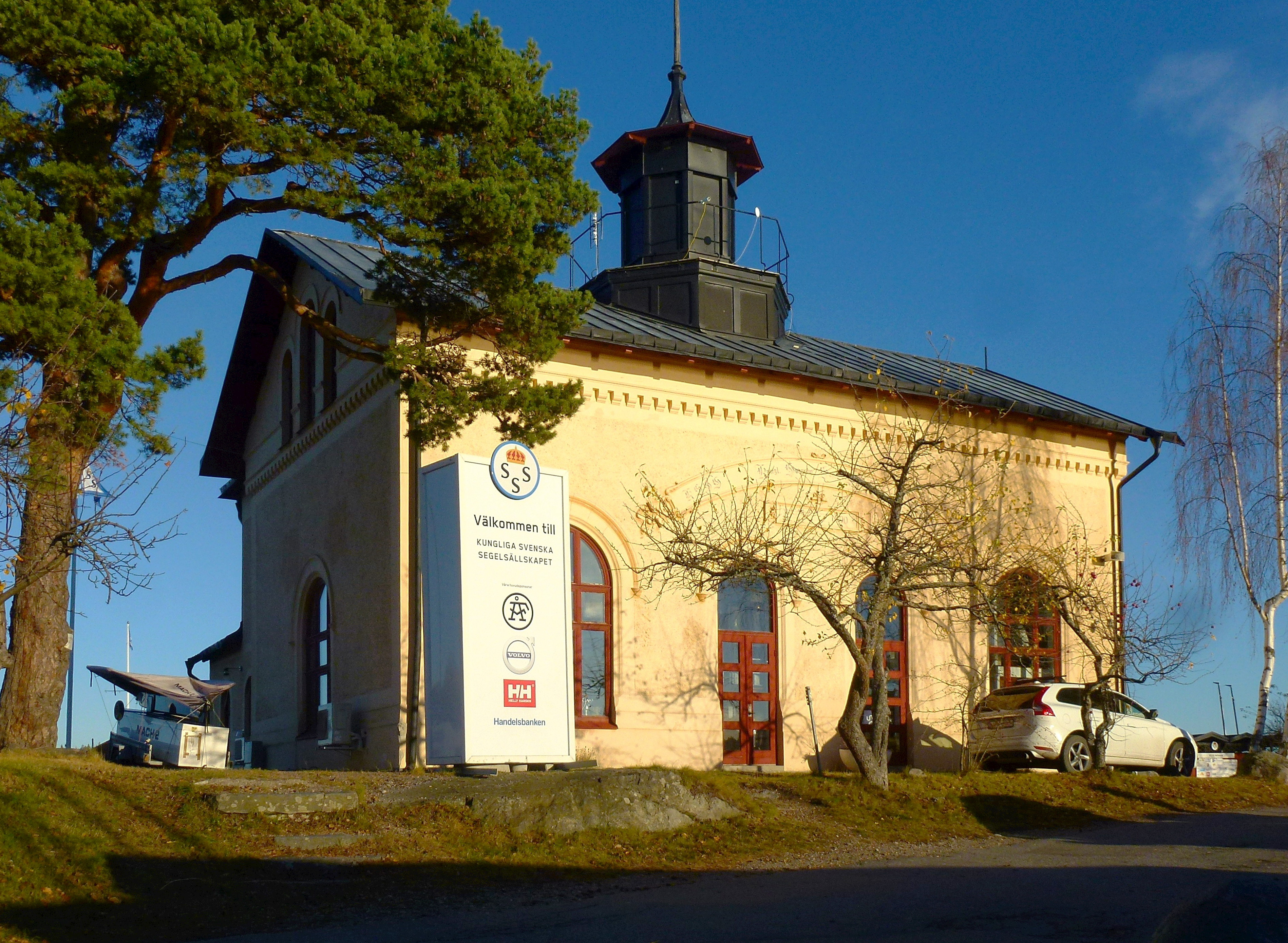 Saltsjöbadens elektricitesverk